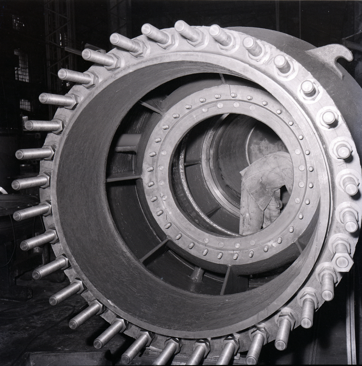 Servizio fotografico : Legnano, 1958 / Paolo Monti. - Buste: 19, Fototipi: 19 : Negativo b/n, gelatina bromuro d'argento/ pellicola ; 6x6. - ((Serie costituita da 10 buste di carta, tenute insieme da una graffetta, identificate con i una doppia numerazione: R21840/ R601, R21841/ R602, R21842/ R603, R21843/ R604, R21844/ R605, R21845/ R606, R21846/ R607, R21847/ R608, R21848/ R609, R21849/ R610, R21850/ R611, R21851/ R612, R21852/ R613, R21853/ R614, R21855/ R616, R21857/ R618, R21858/ R634, R21859/ R635, R21860/ R636. - Fonte: Agenda di Paolo Monti: Foto Leica 1 / 1-51 verde, 1-110 nera (1958-1963), presso Archivio Paolo Monti